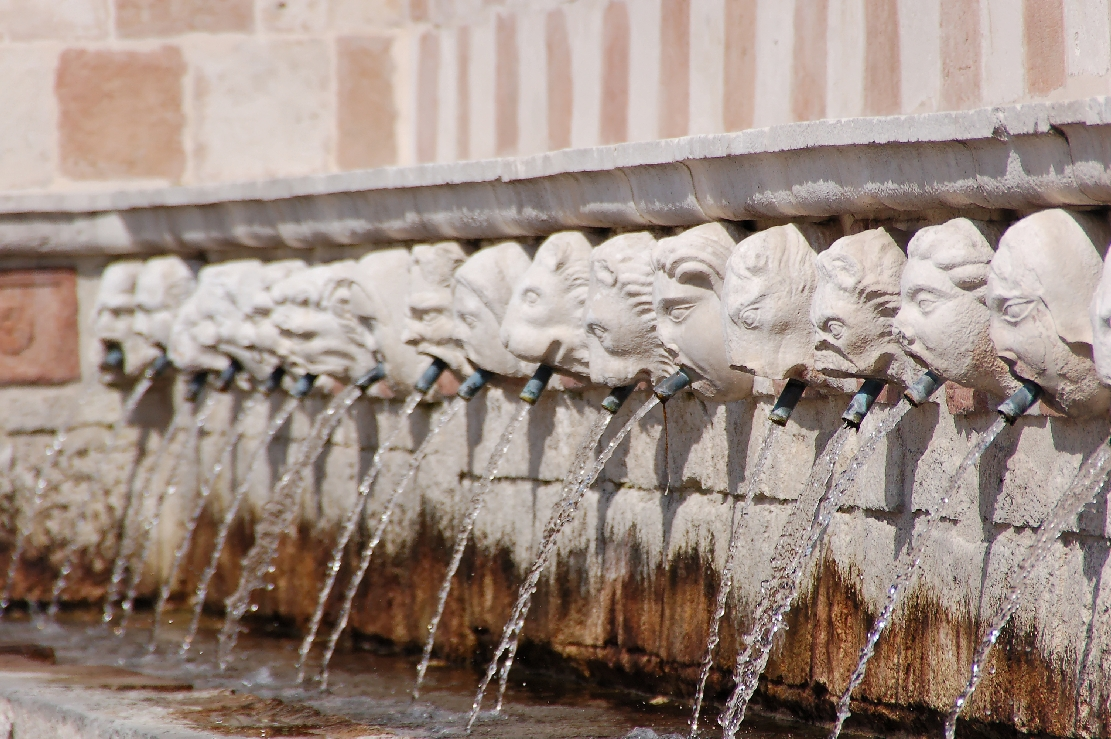 L'Aquila 2011